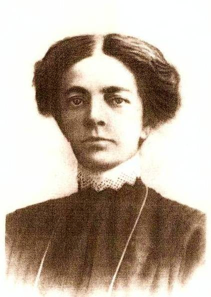 Русская революционерка, политический и общественный деятель Екатерина Дмитриевна Кускова (1869-1958)